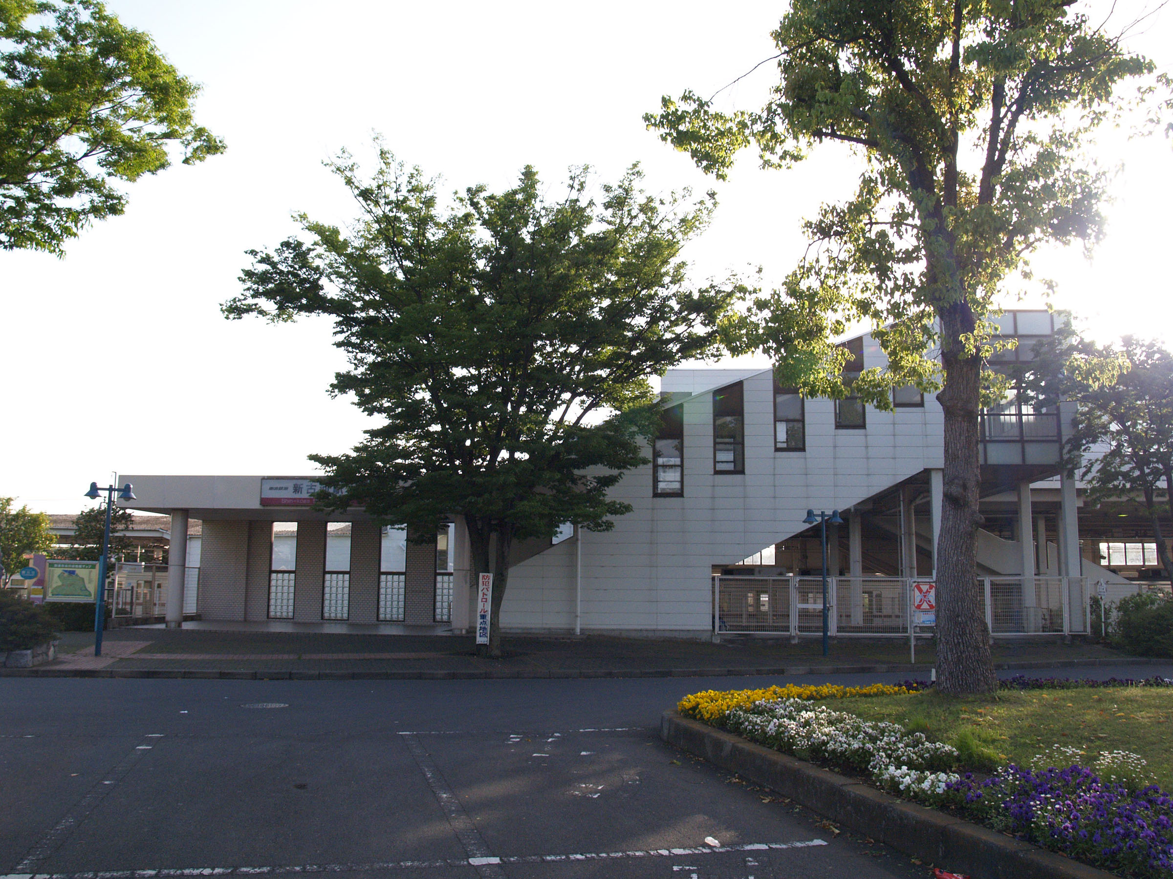 新古河駅西口